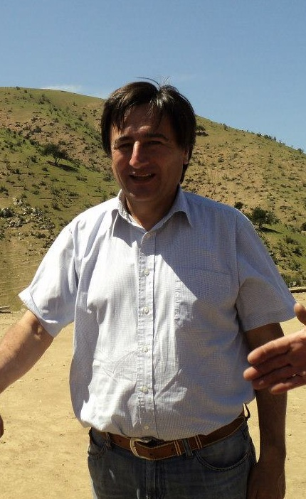 ALCALDE 2012-2016